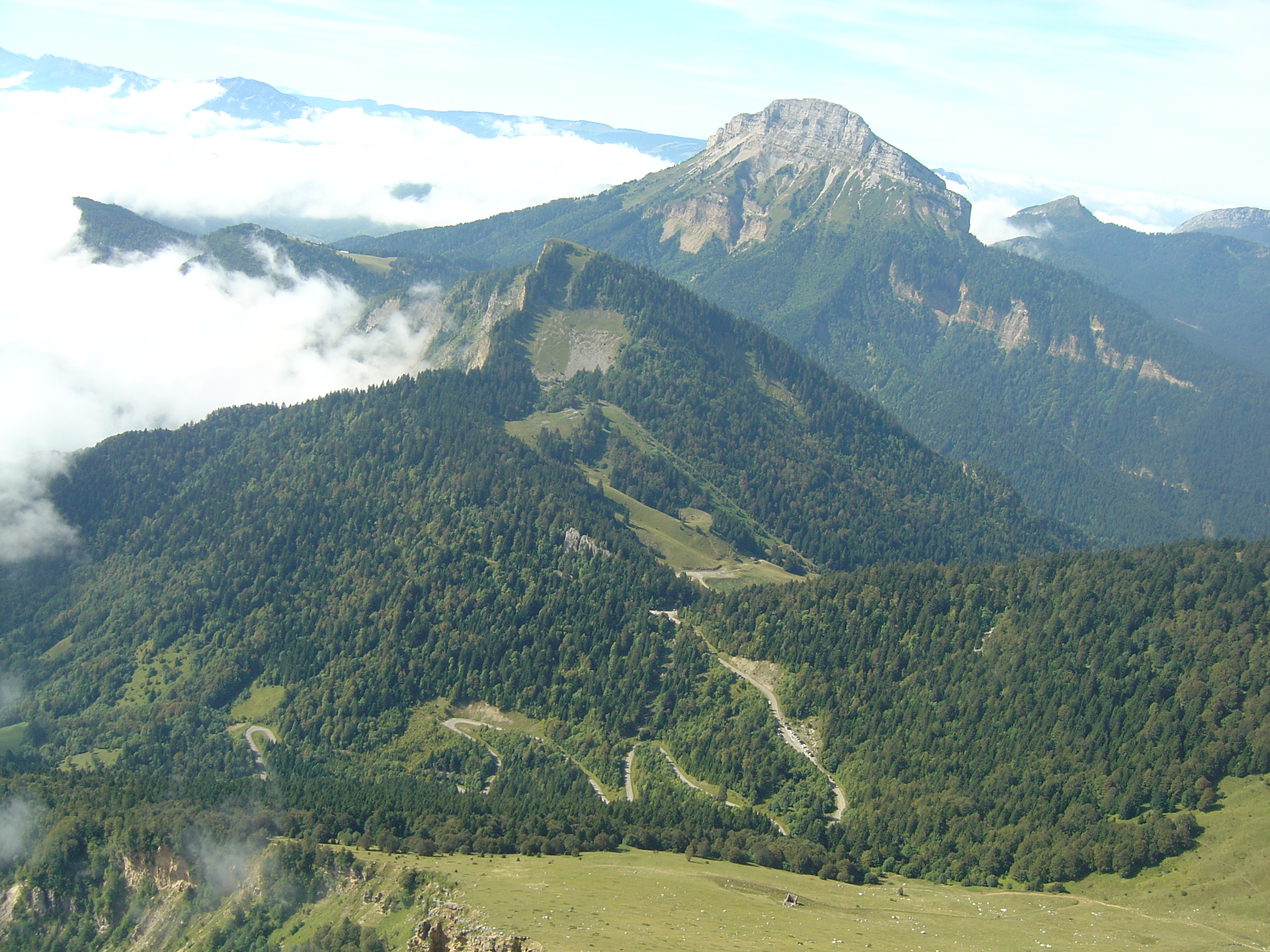 Lacets du col de Coq (1434m) vus depuis l'ascension de la dent de Crolles par le Pas de l'Oeil. On aperçoit Chamechaude (2082m) plus haut.